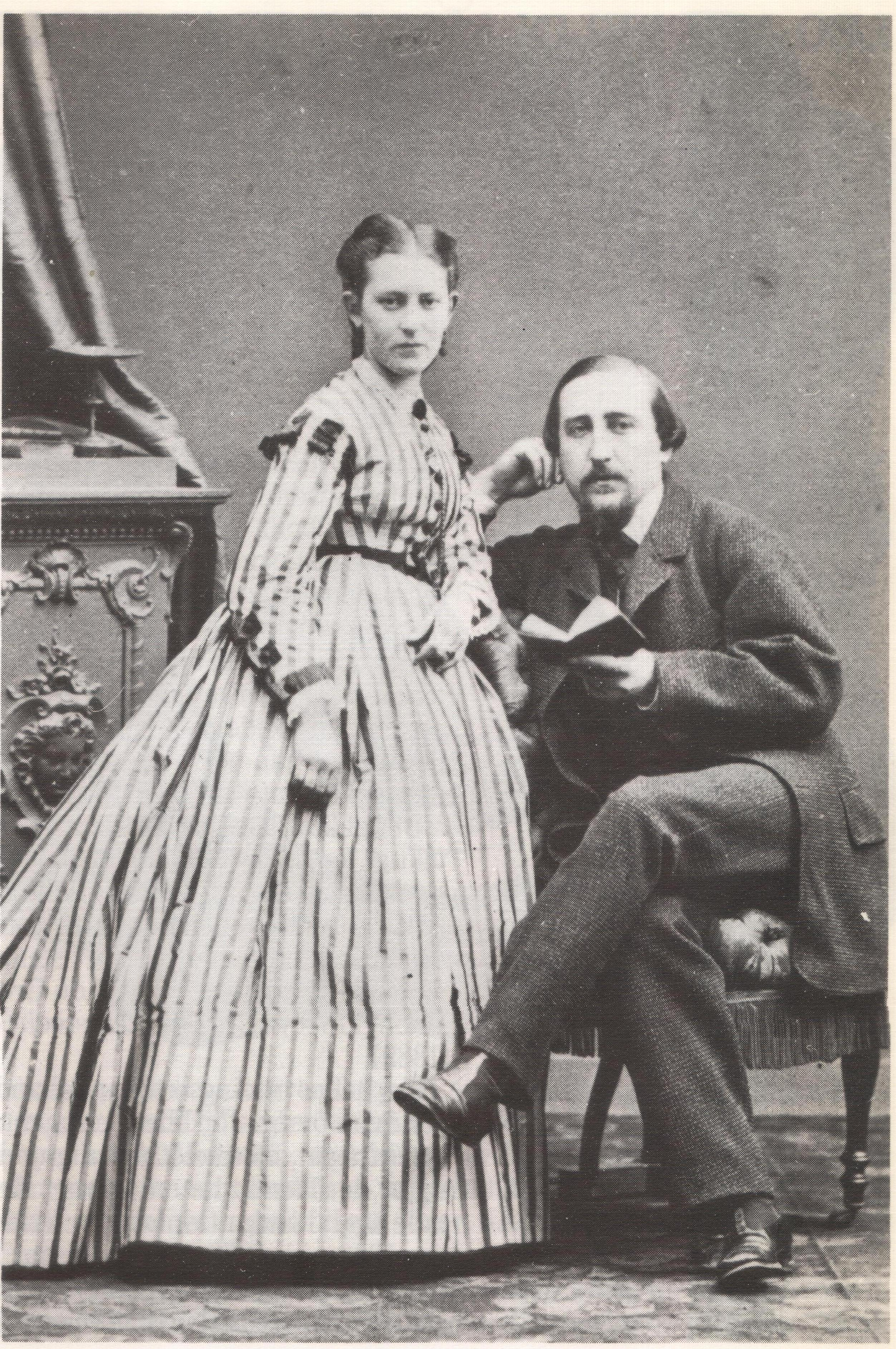 Leo Mechelin ja hänen vaimonsa Alexandra häämatkallaan Pariisissa kevättalvella 1866.